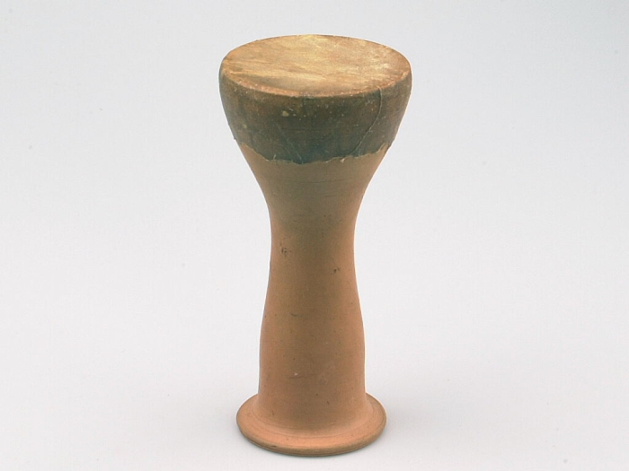 Het vel van deze bekertrom is op het tromlichaam van aardewerk gelijmd. De onderkant van het tromlichaam is open.